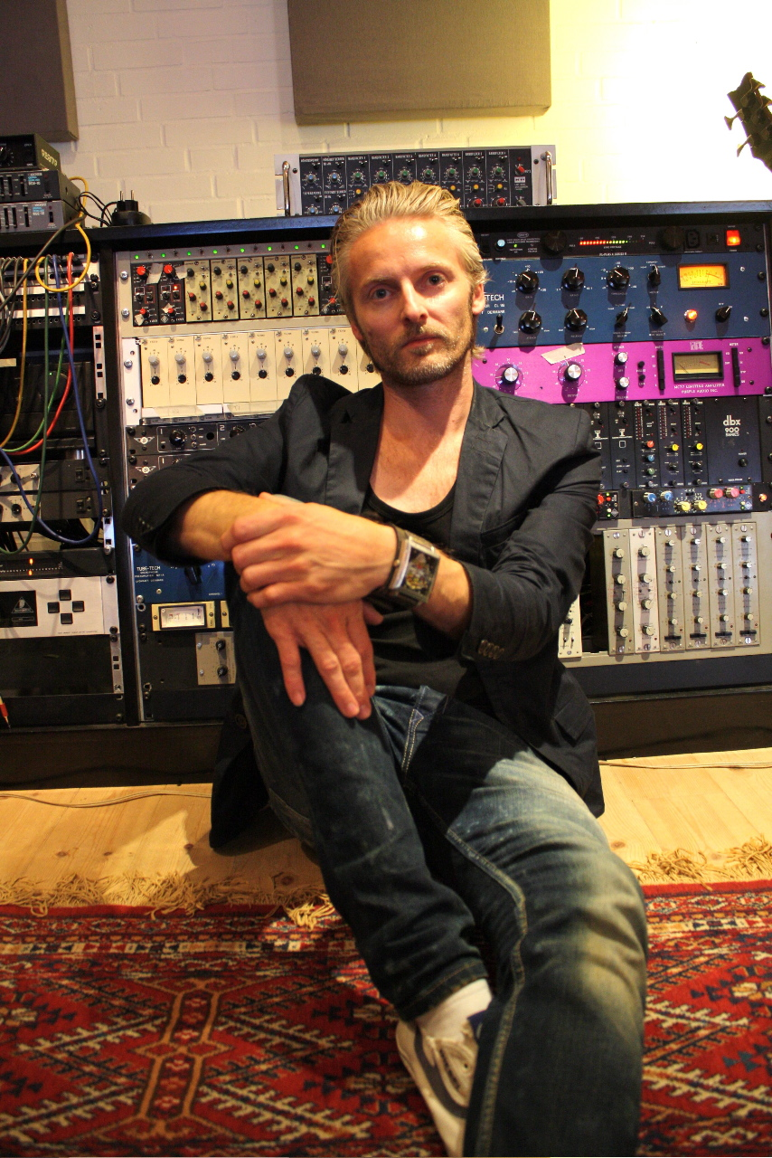 Billede af Jacob Hansen i Hansen Studios 2011